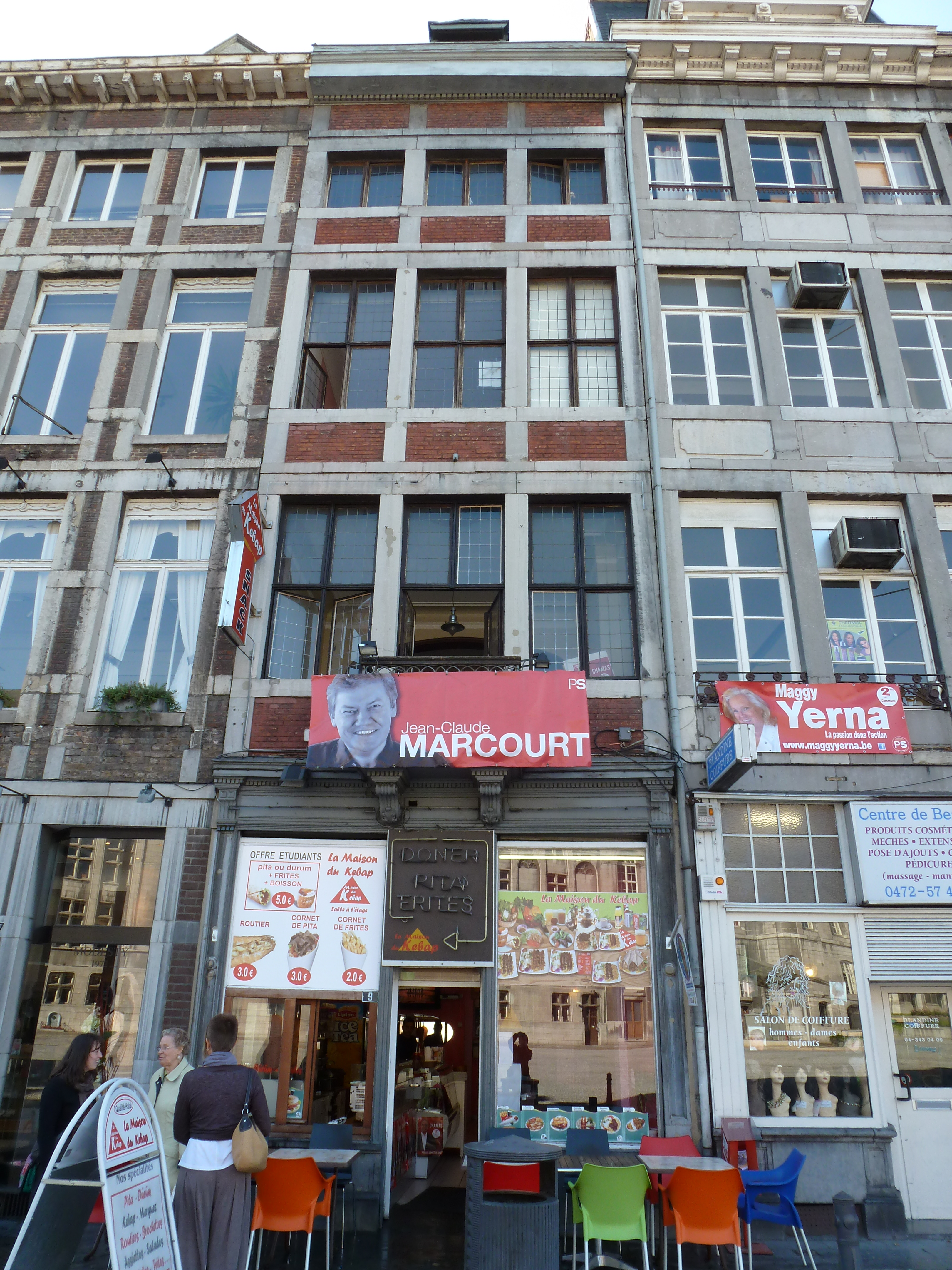 maison ancienne